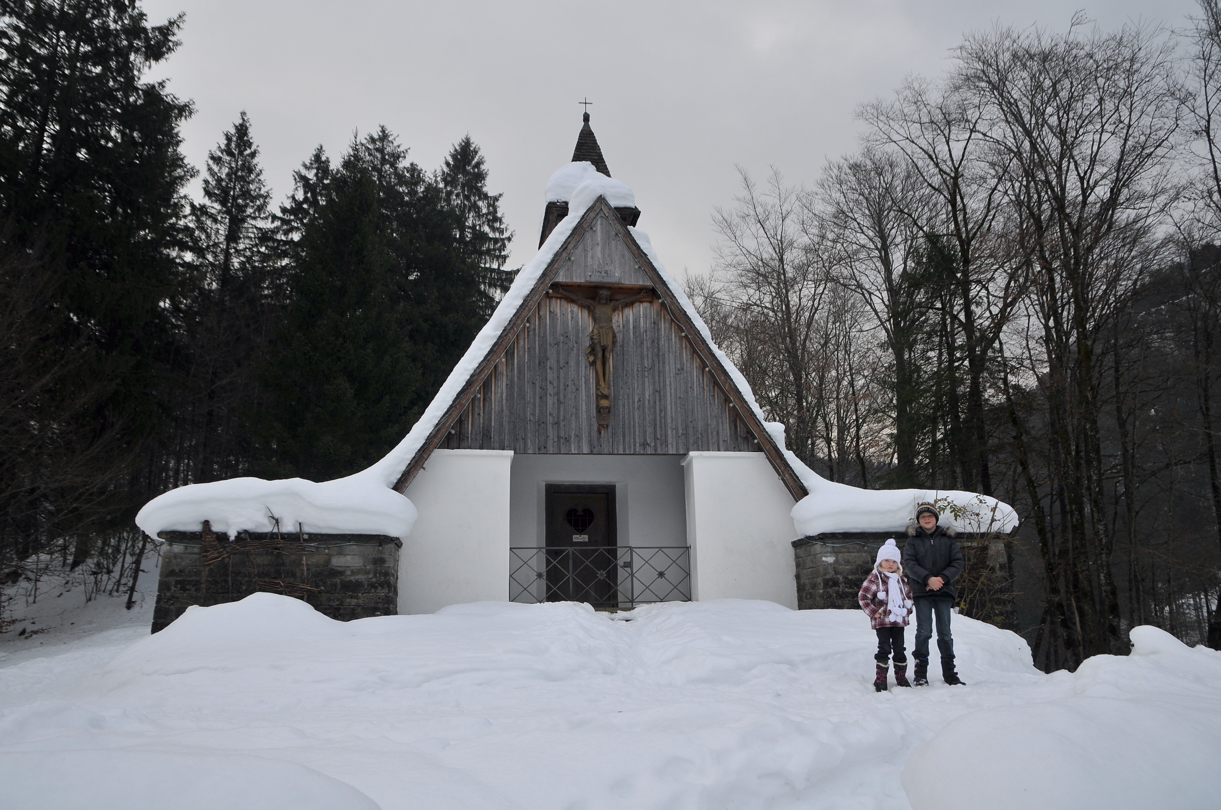 Die Kriegergedächtniskapelle auf dem Ölberg im Bezauer Ortsteil Greben. Die Kapelle wurde 1924 nach Plänen von Kaspar Albrecht erbaut.